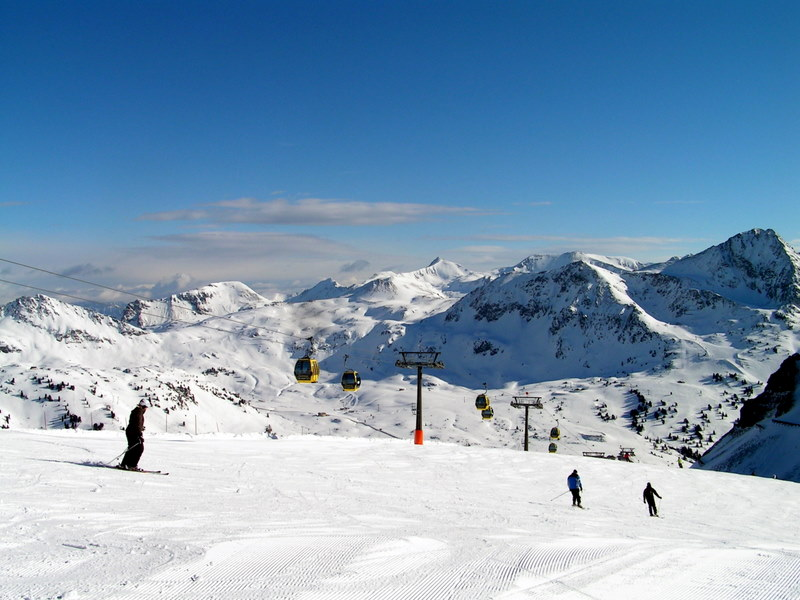 Obertauern ski resort